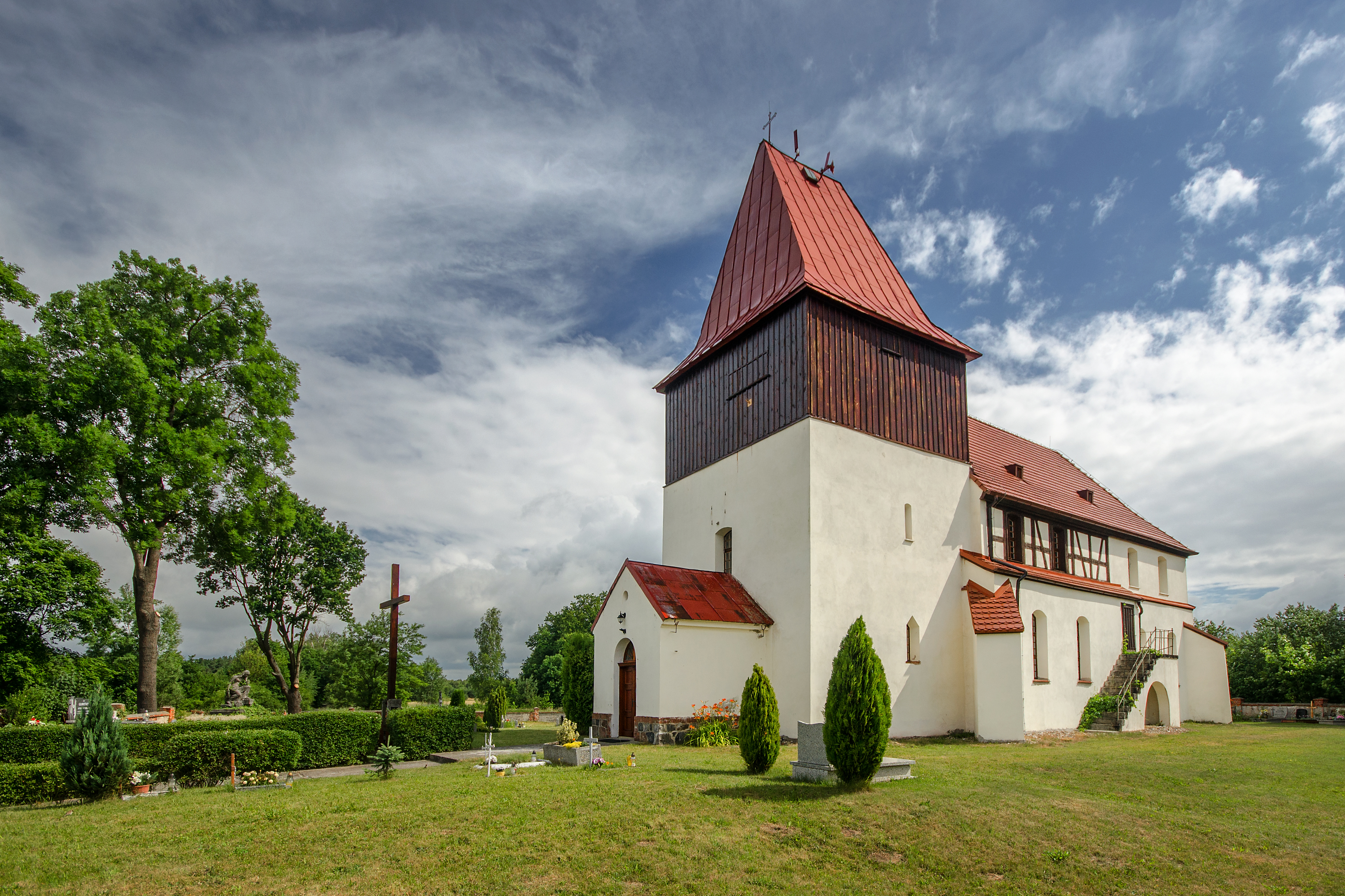 Miłogostowice, kościół fil. p.w. św. Stanisława, XVI, XVIII